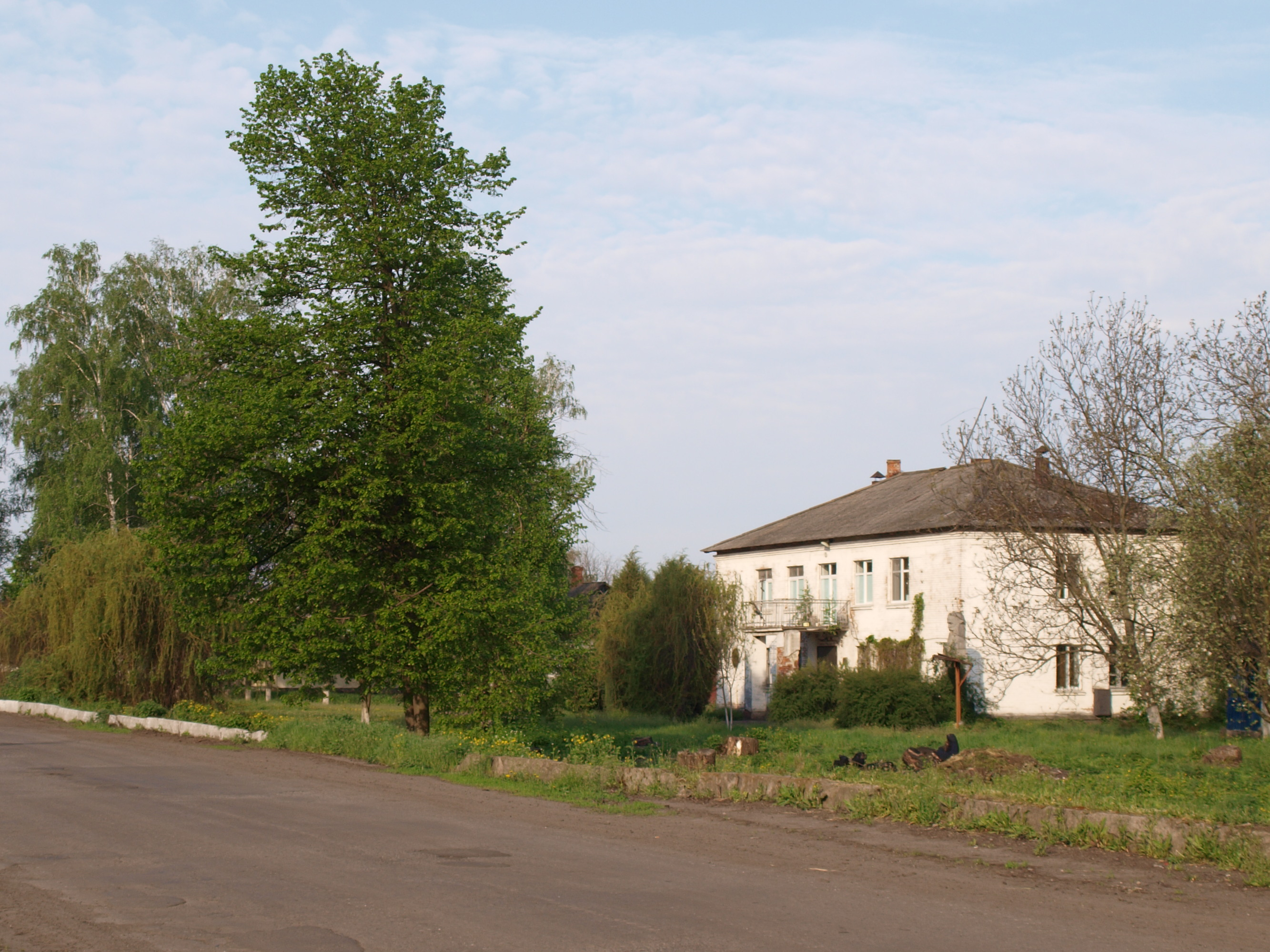 с.Куликове, Полтавський р-н, Полтавська обл.